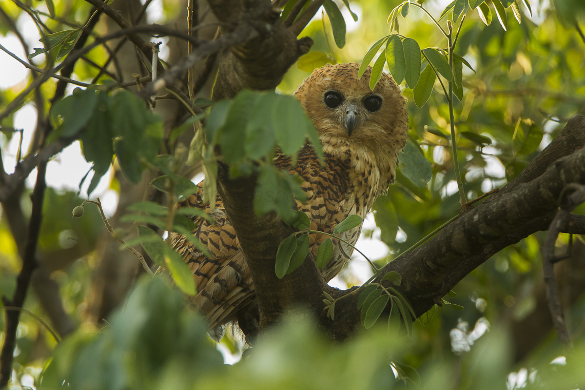 Pel's Fishing-Owl - Malawi_S4E1943